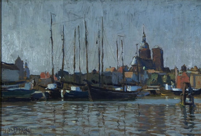 Ansicht von Stralsund. Öl, 32.0 x 47.0 cm